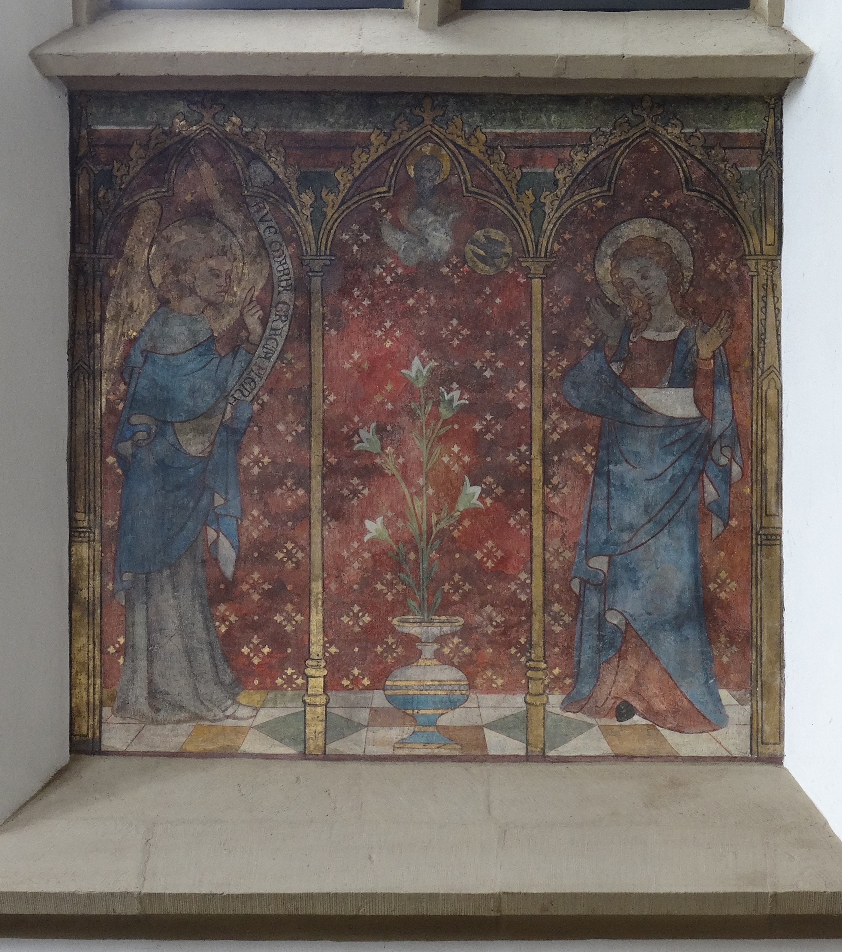 Verkündigungsfresko in der Wallfahrtskirche Zur schmerzhaften Mutter in Hennef-Bödingen, um 1500